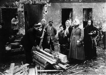 War communism - Distributing fuel rations